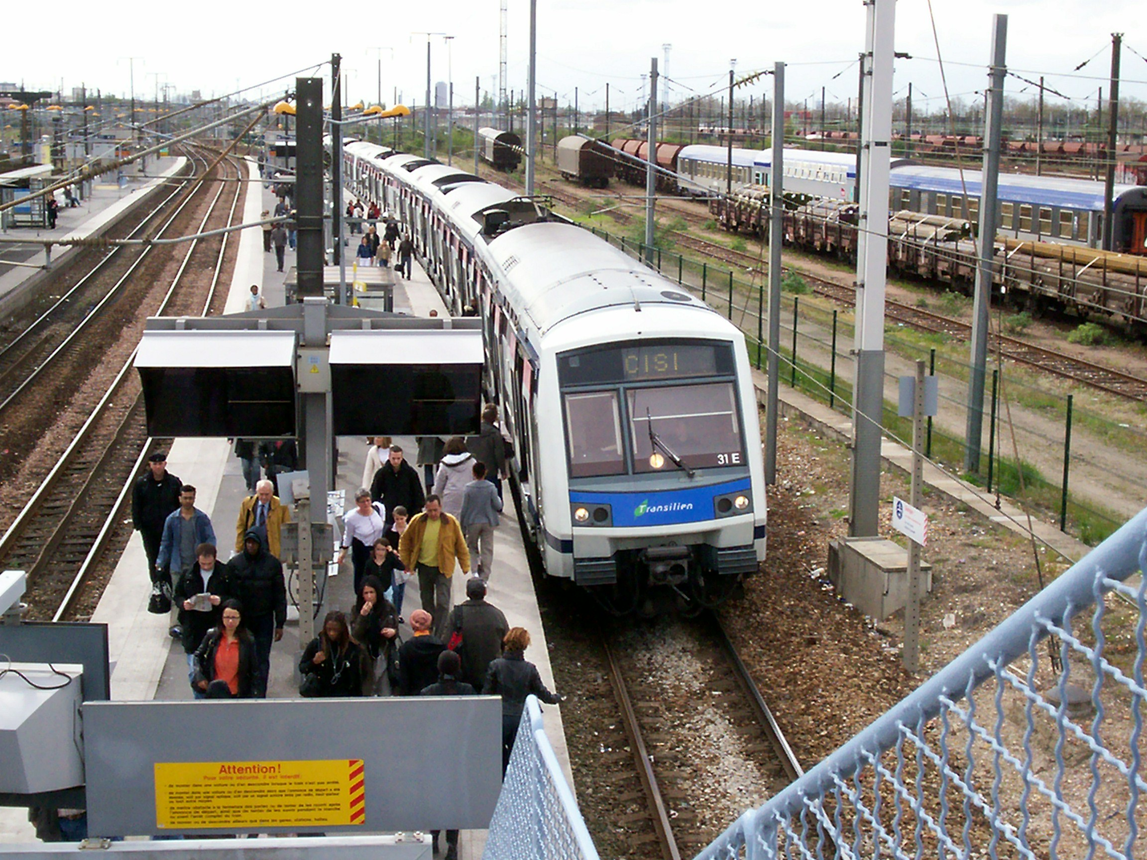 Vue aérienne d'un train CISI à Noisy